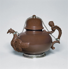 um 1710/15 Meißener Porzellan-Sammlung Stiftung Ernst Schneider in Schloss Lustheim